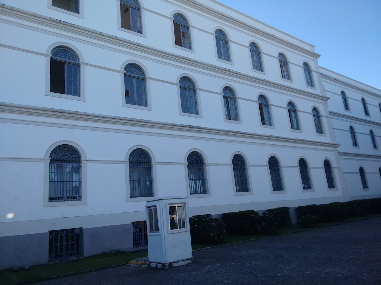 IMIP - Instituto Materno Infantil de Pernambuco, em Recife. Fachada prédio antigo.